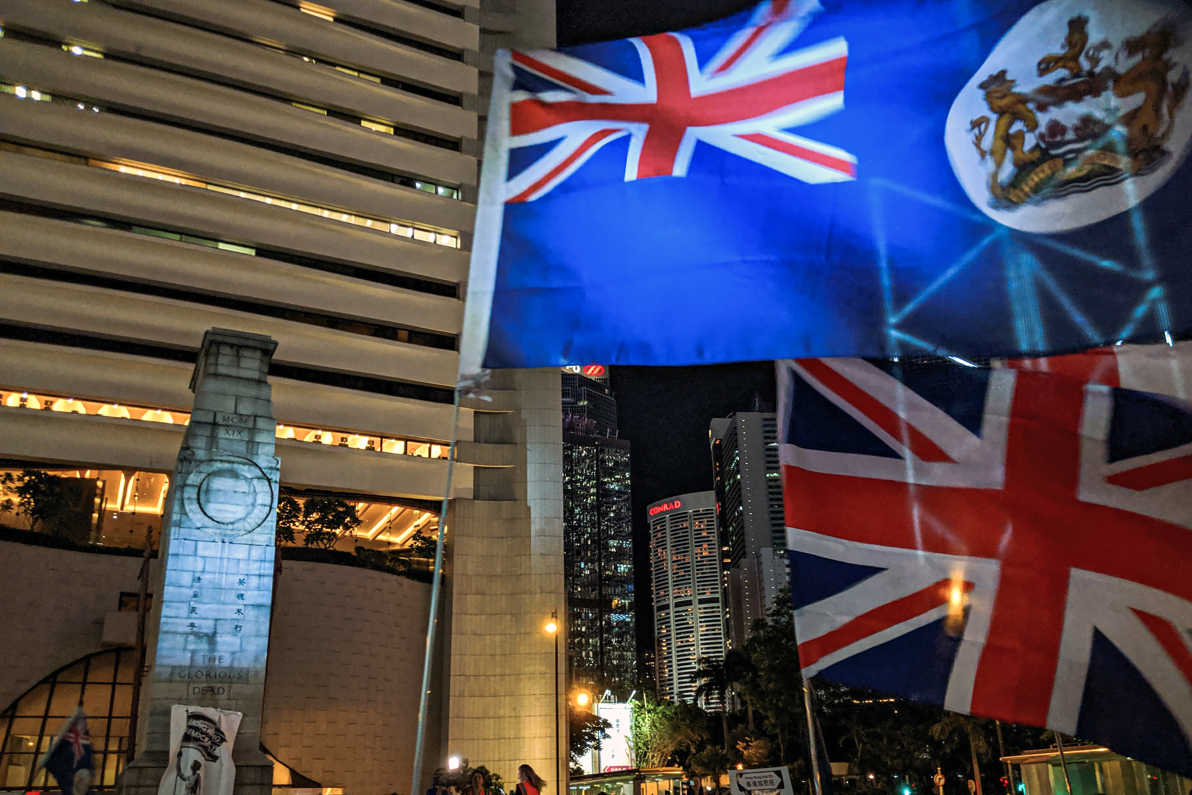 IMG_20190830_210438_1